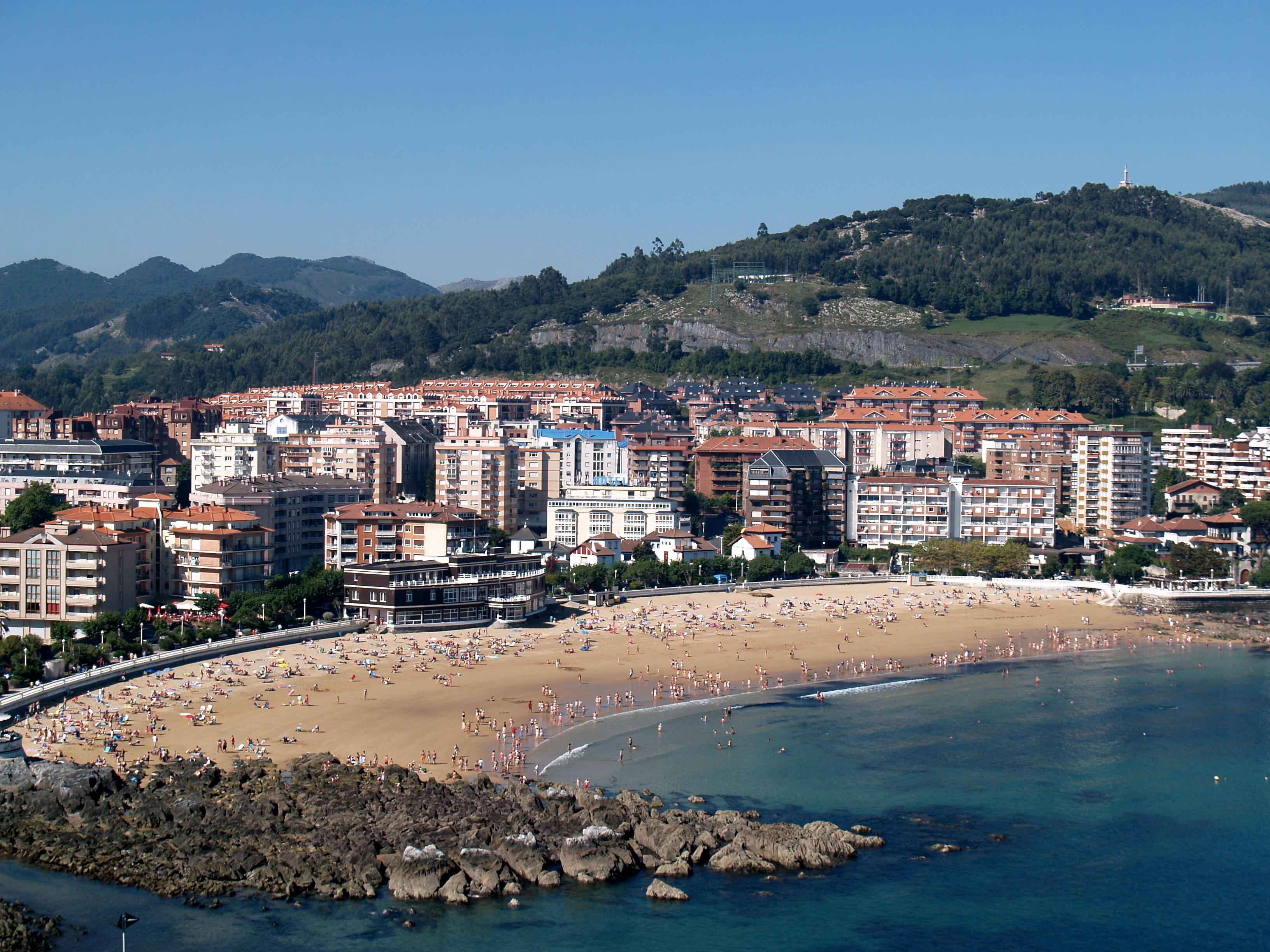 Template:Playa de Brazomar en Castro-Urdiales (Cantabria, España).